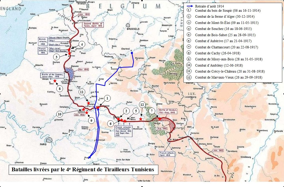 Campagne du 4e Régiment de Tirailleurs Tunisiens (4e RTT) pendant la 1ère Guerre Mondiale